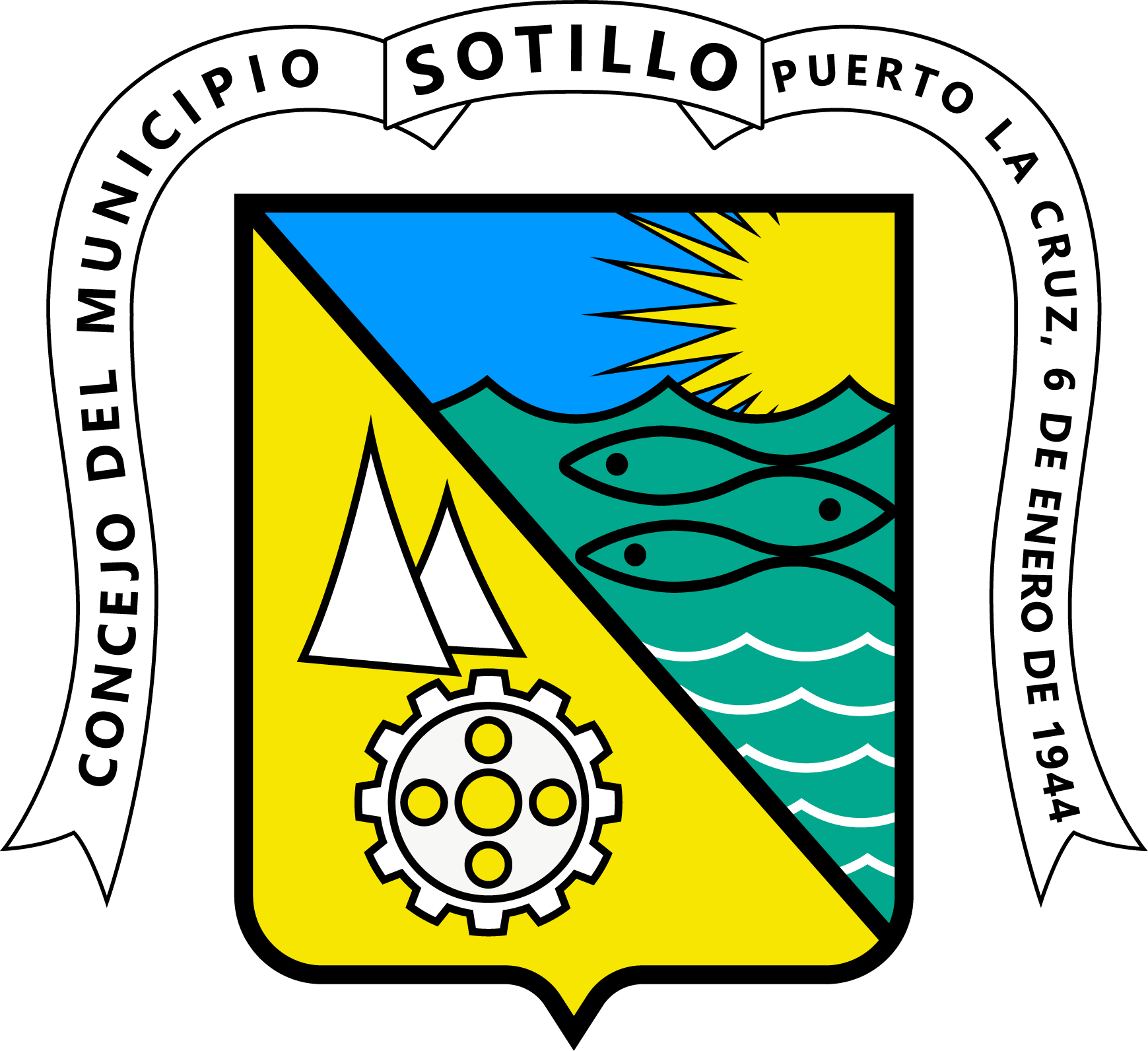 Escudo del municipio Sotillo. Estado Anzoátegui. Venezuela